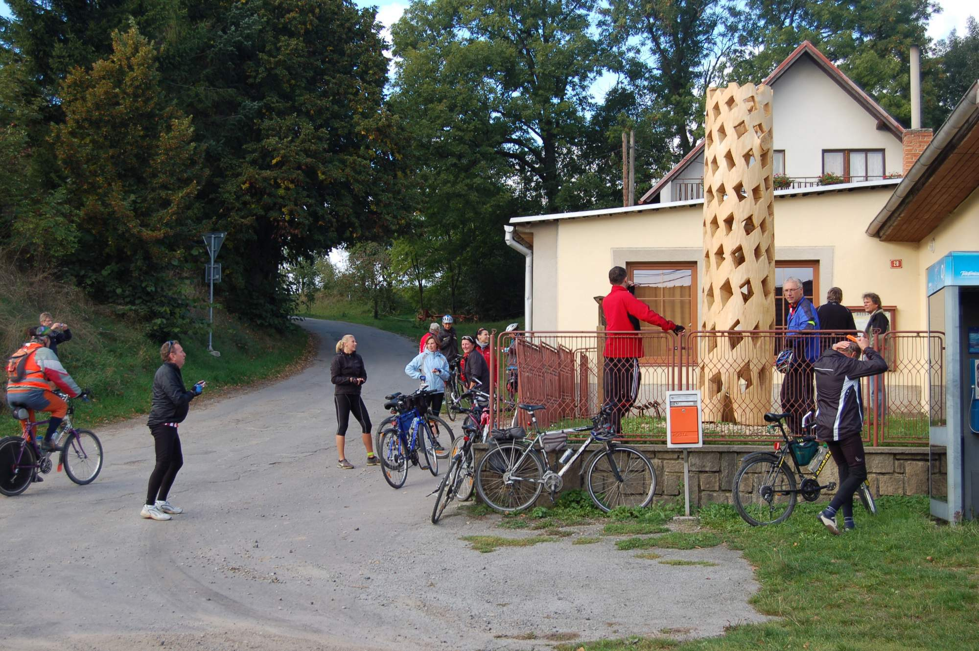 Socha "Křehkost" ve Zvolenovicích